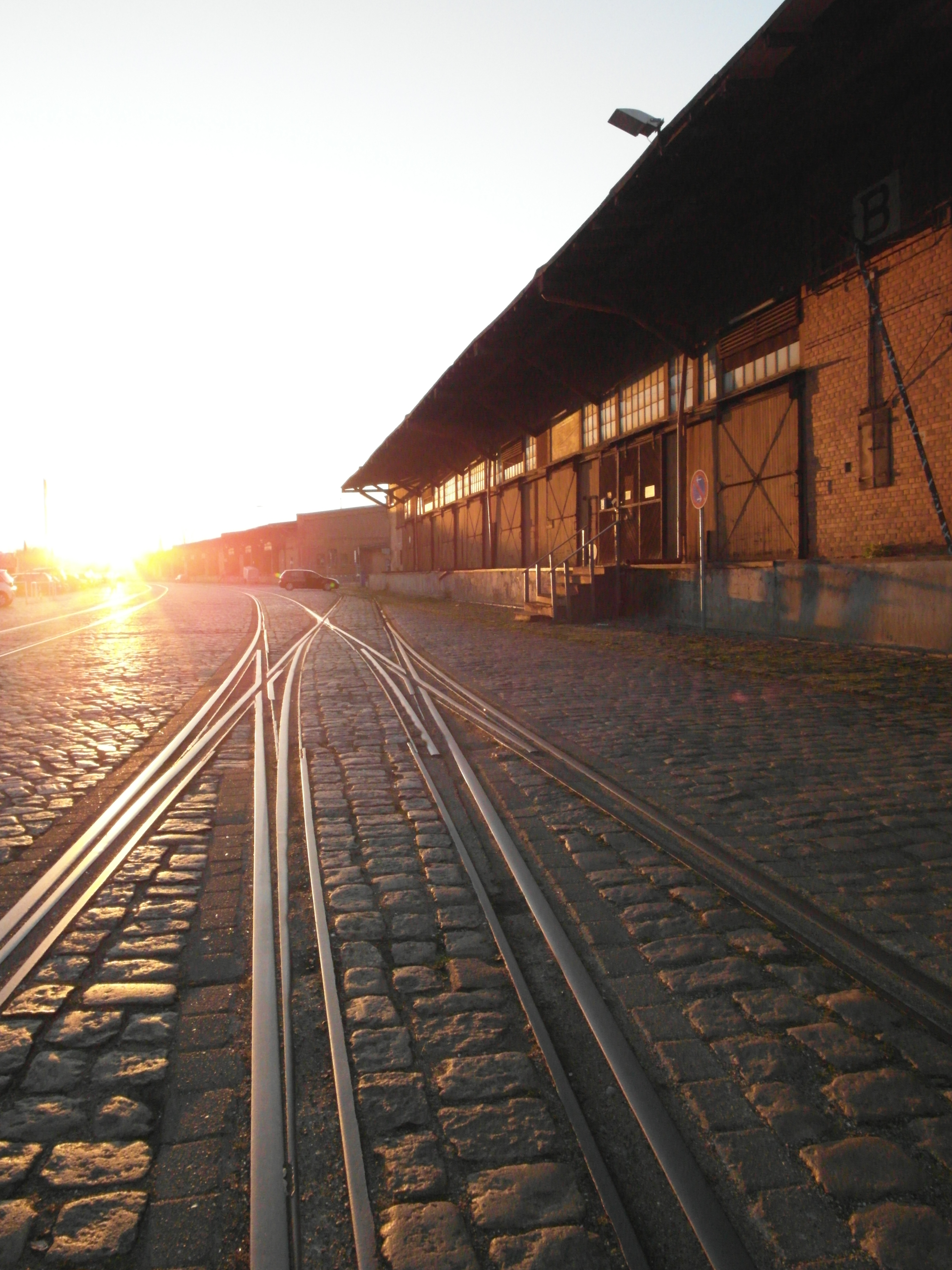 Lübeck - Nördliche Wallhalbinsel - Innere Erschließungsachse mit historischem Gleisfächer und Großsteinpflaster aus der Zeit um 1892 ff. Zentral im Bild eine der Doppelkreuzungsweichen.